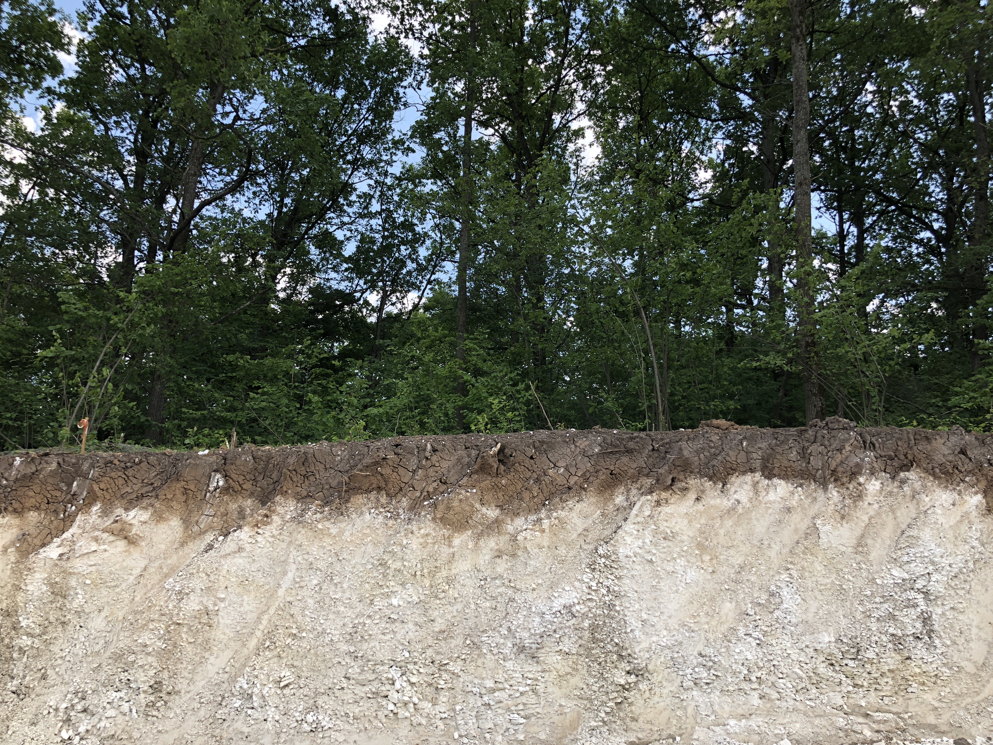 Chernozem soil in Voronezh region, Russia